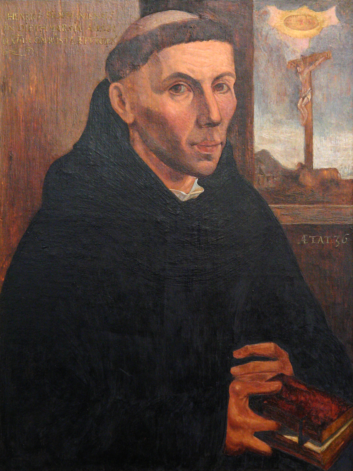 St.Ansgarii-Kirche in Bremen. Gemälde (Ausschnitt): Heinrich von Zütphen. Rahmentext: Heinrich von Zütphen († 1524) Kopie nach einem Original im Dithmarscher Landesmuseum in Meldorf.